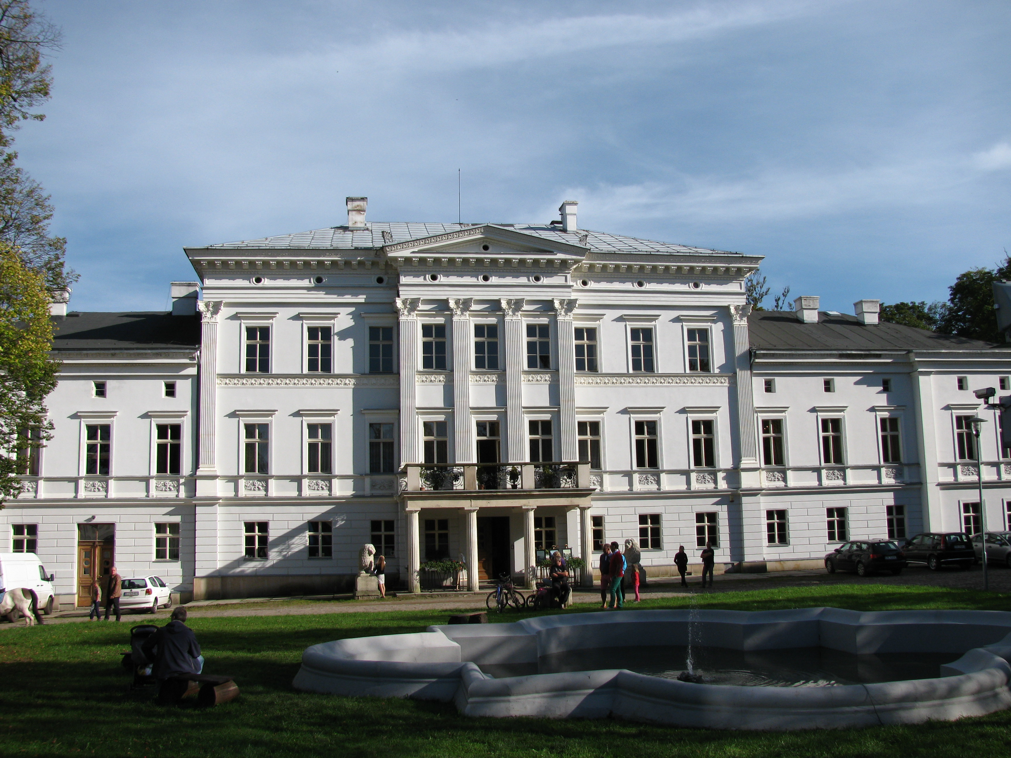 Jedlina-Zdrój Jedlinka, ul. Zamkowa 8 - pałac